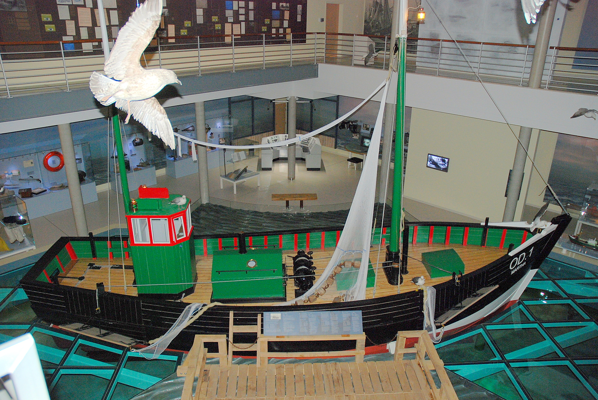 De OD.1 Martha in het Nationaal Visserijmuseum te Oostduinkerke (België)